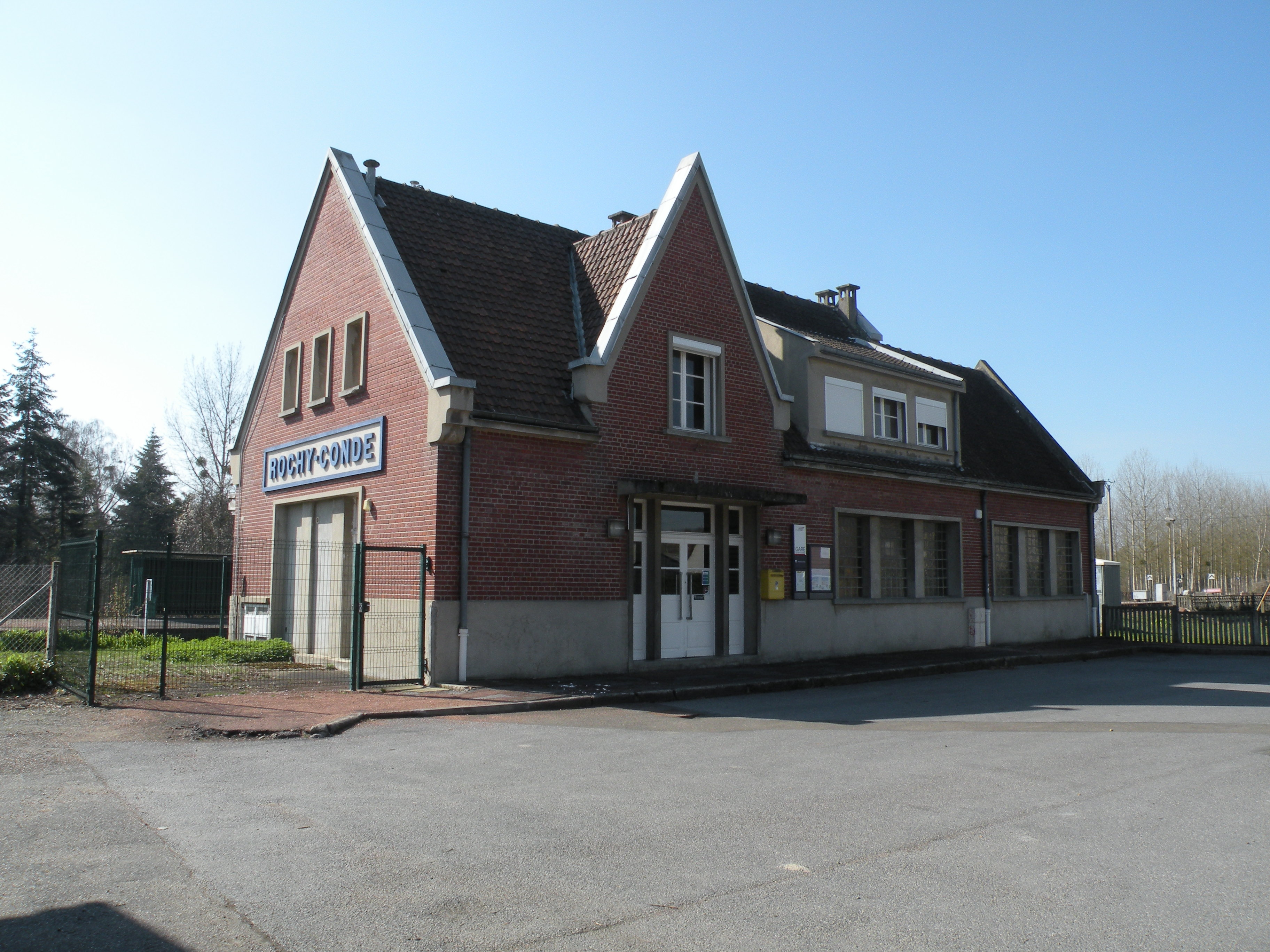 gare de Rochy-Condé